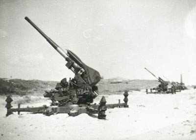 Een Vickers 3,7 inch luchtdoelkanon in stelling op het schietterrein Kijkduin van de luchtdoelartillerie van de Koninklijke Landmacht in Den Helder. Op de achtergrond rechts is de vuurtoren 'Lange Jaap' te zien en in het midden aan de horizon Fort Kijkduin.